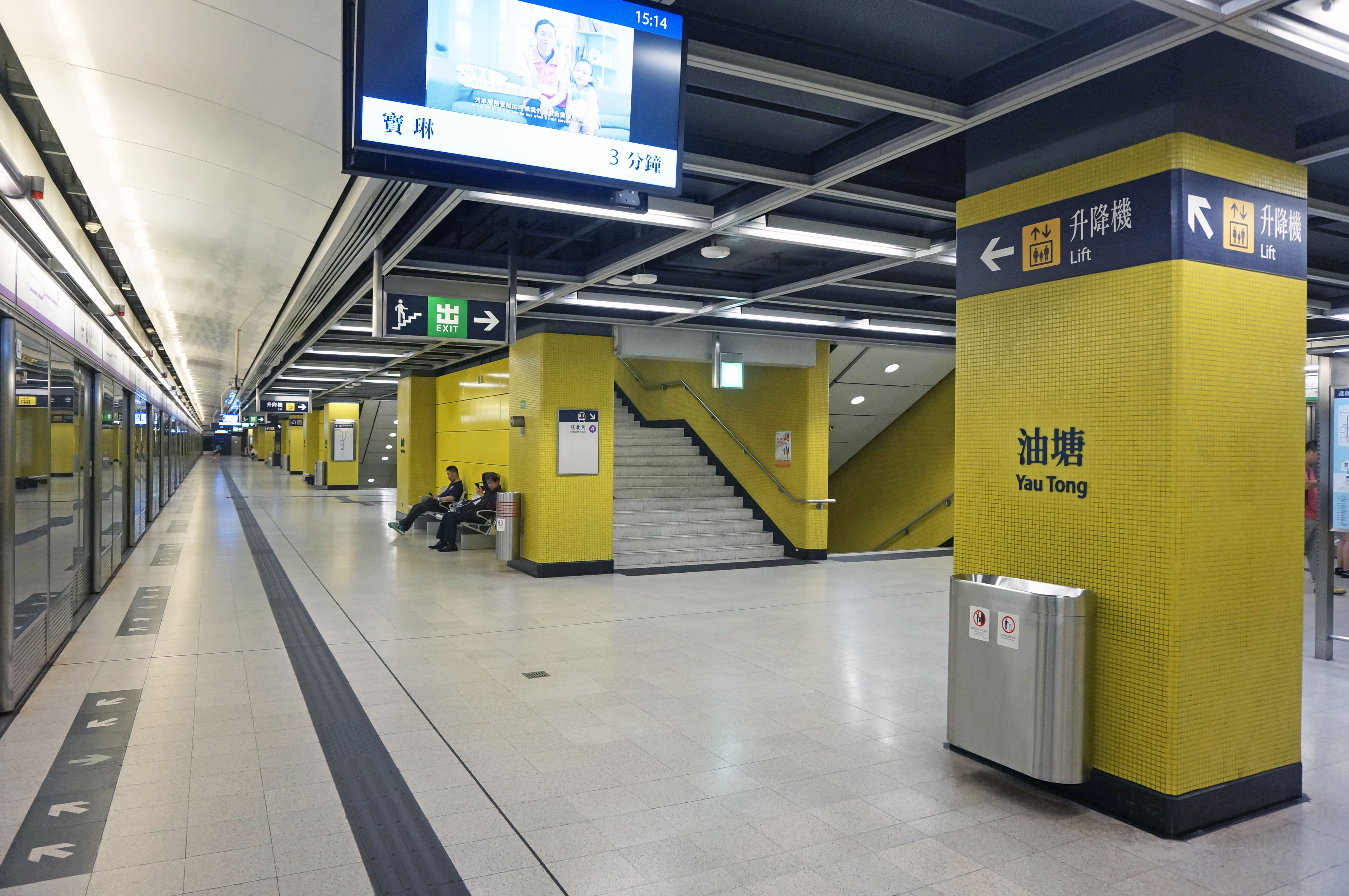 港鐵油塘站月台